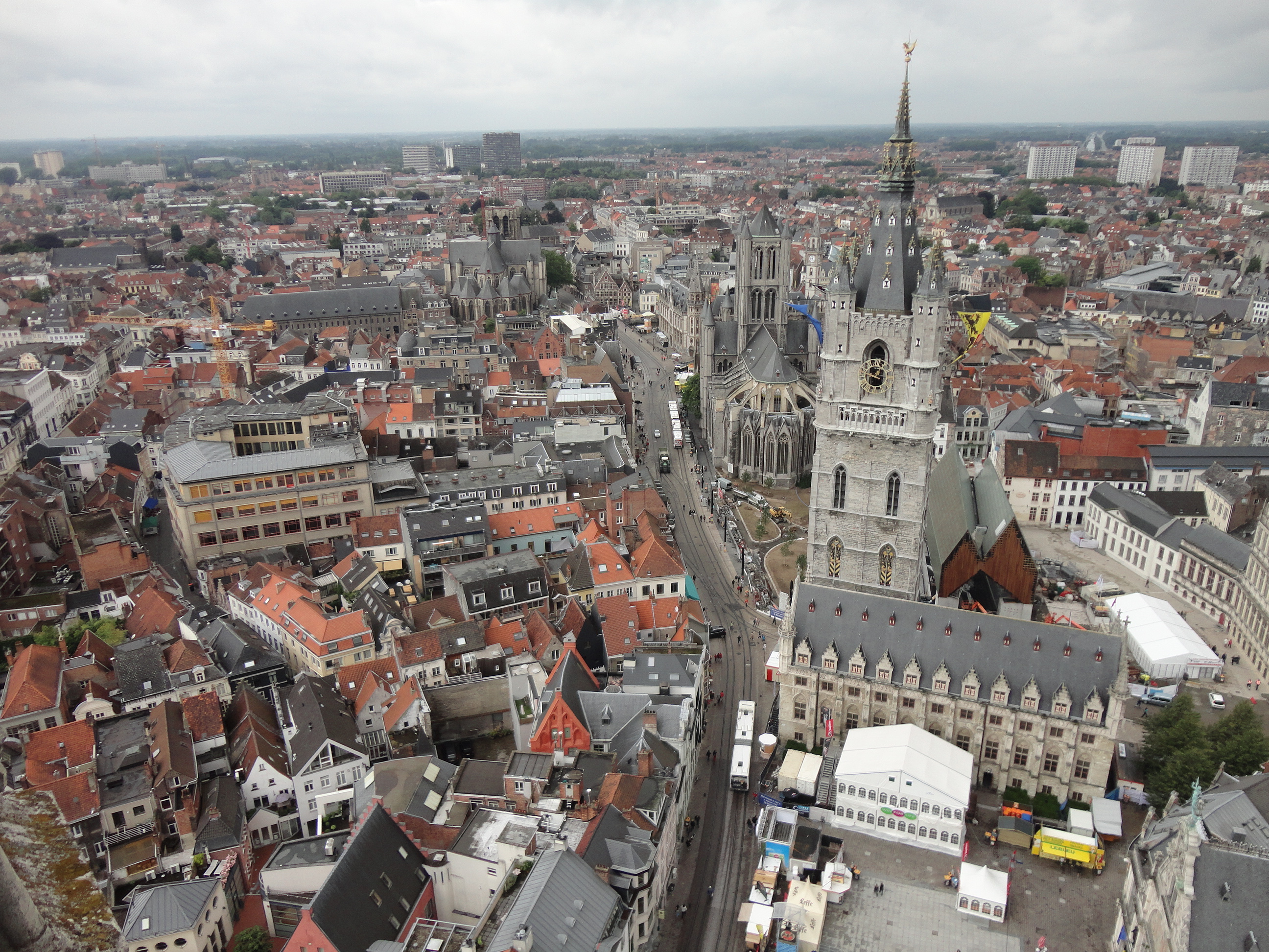 Gand vue du haut du clocher de la cathédrale